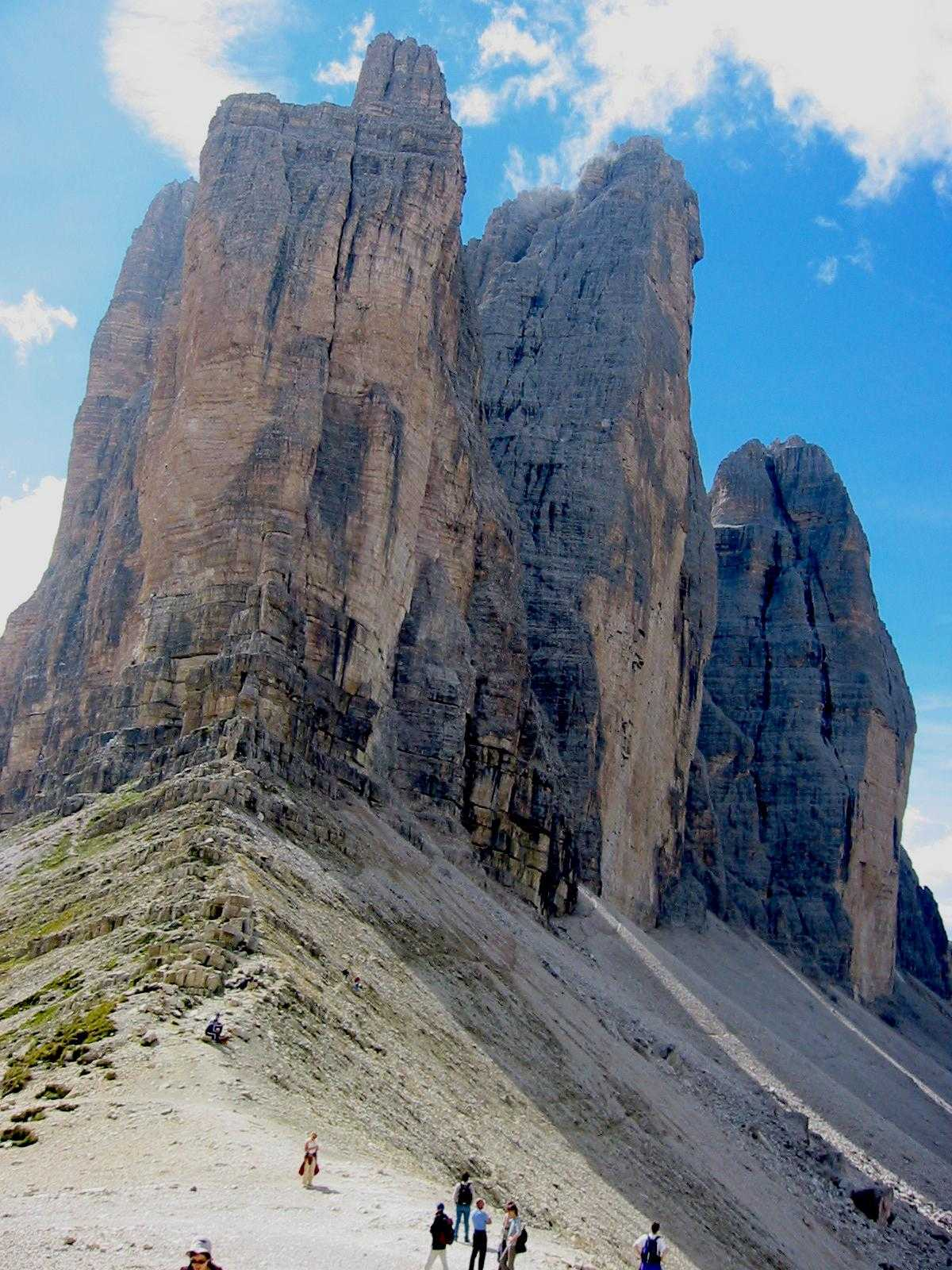 Le Tre Cime di Lavaredo, foto scattata in settembre 2004 da Fantasy :-)